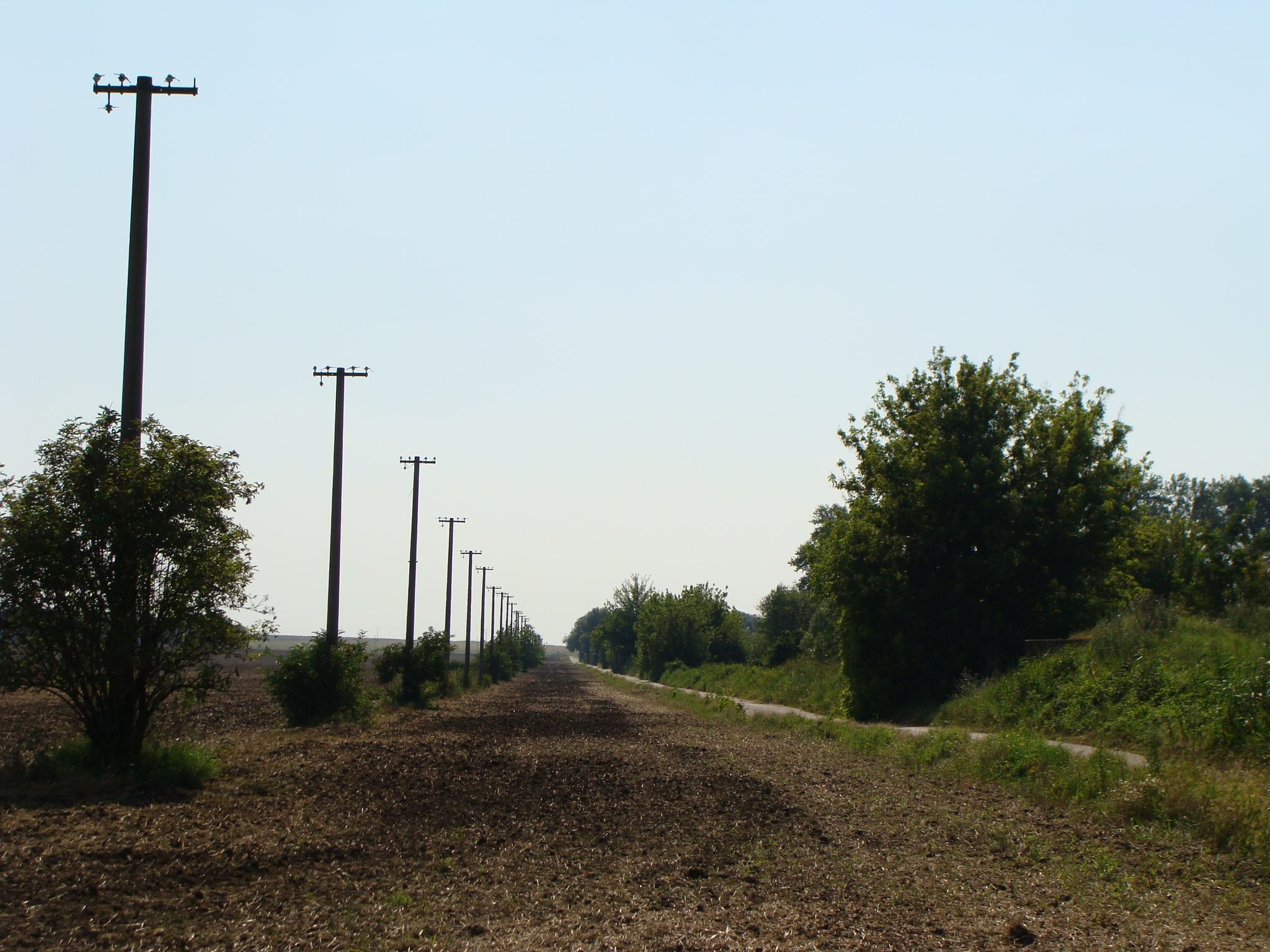 Ehemaliger Grenzstreifen und Kolonnenweg nahe Hrušovany nad Jevišovkou (Grußbach)